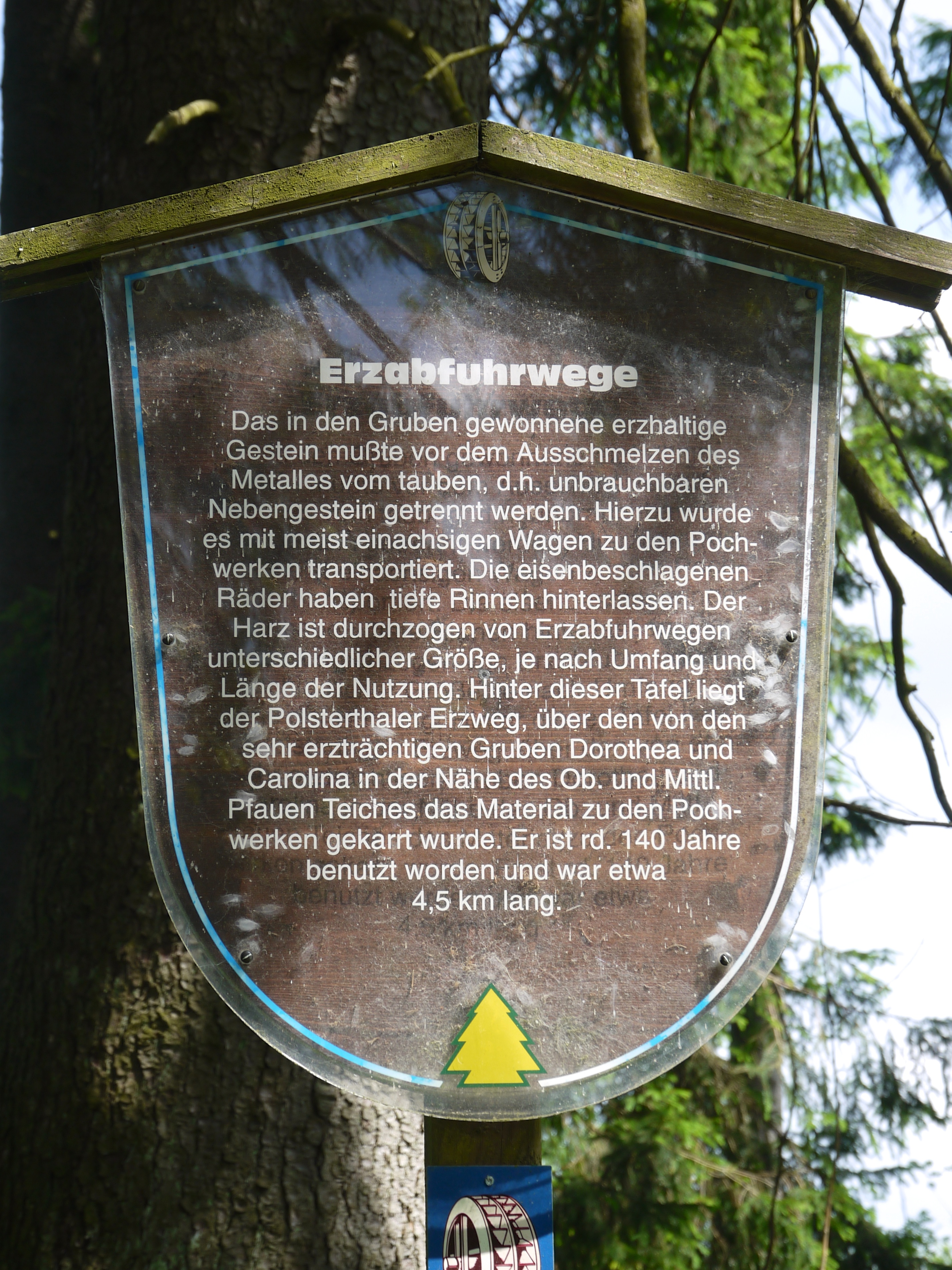 Informationstafel zu den Erzabfuhrwegen. Standort der Tafel: An der Wegekreuzung etwa 40 m nordwestlich vom Zechenhaus. Der Text lautet: „Das in den Gruben gewonnene erzhaltige Gestein mußte vor dem Ausschmelzen des Metalles vom tauben, d. h. unbrauchbaren Nebengestein getrennt werden. Hierzu wurde es mit meist einachsigen Wagen zu den Pochwerken transportiert. Die eisenbeschlagenen Räder haben tiefe Rinnen hinterlassen. Der Harz ist durchzogen von Erzabfuhrwegen unterschiedlicher Größe, je nach Umfang und Länge der Nutzung. Hinter dieser Tafel liegt der Polsterthaler Erzweg, über den von den sehr erzträchtigen Gruben Dorothea und Carolina in der Nähe des Ob. und Mittl. Pfauen Teiches das Material zu den Pochwerken gekarrt wurde. Er ist rd. 140 Jahre benutzt worden und war etwa 4,5 km lang.